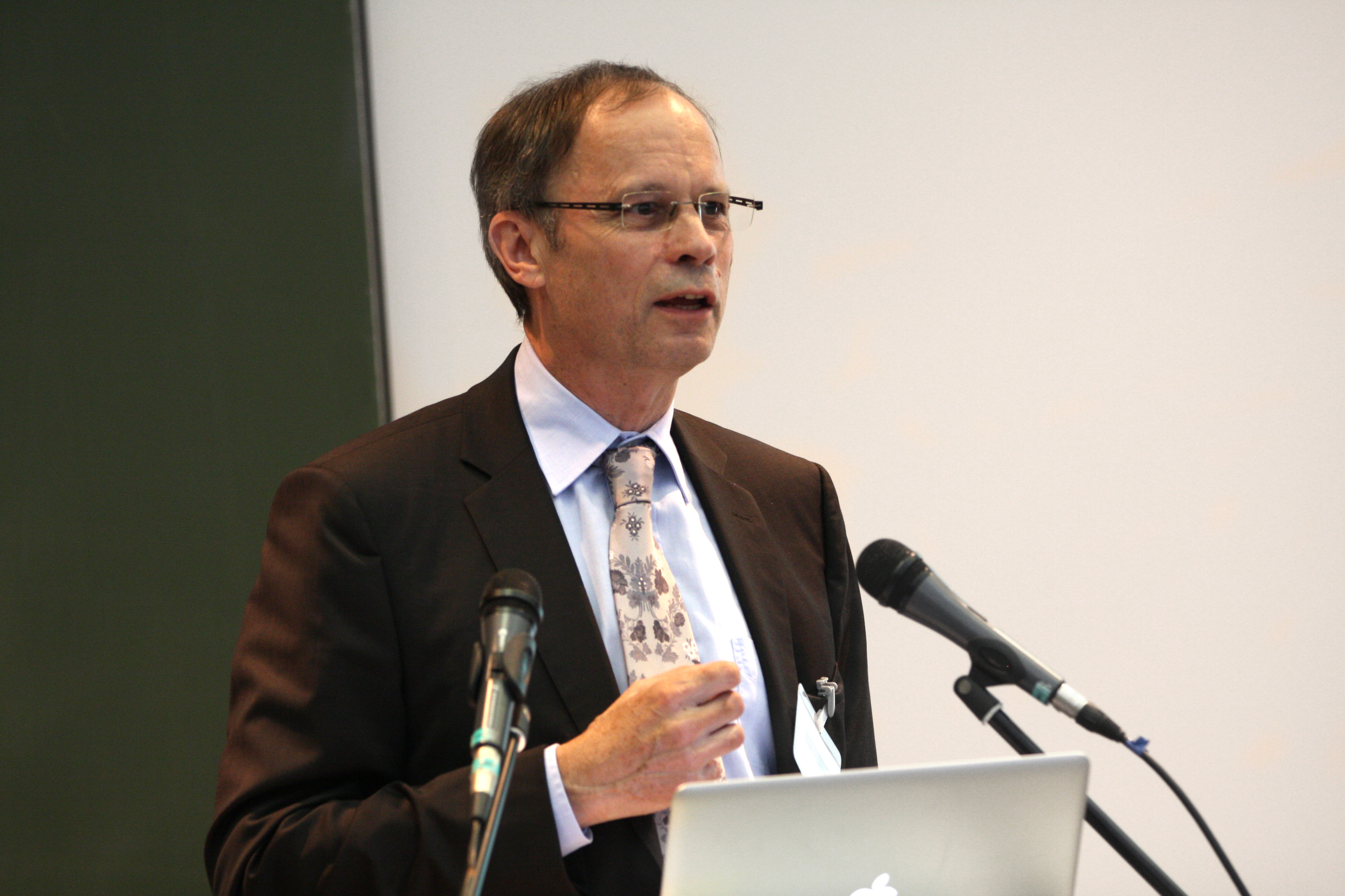 Professeur Jean Tirole X 73 - Médaille d'or du CNRS en 2007. - Prix Nobel d'économie 2014 pour son « analyse du pouvoir de marché et de la régulation »